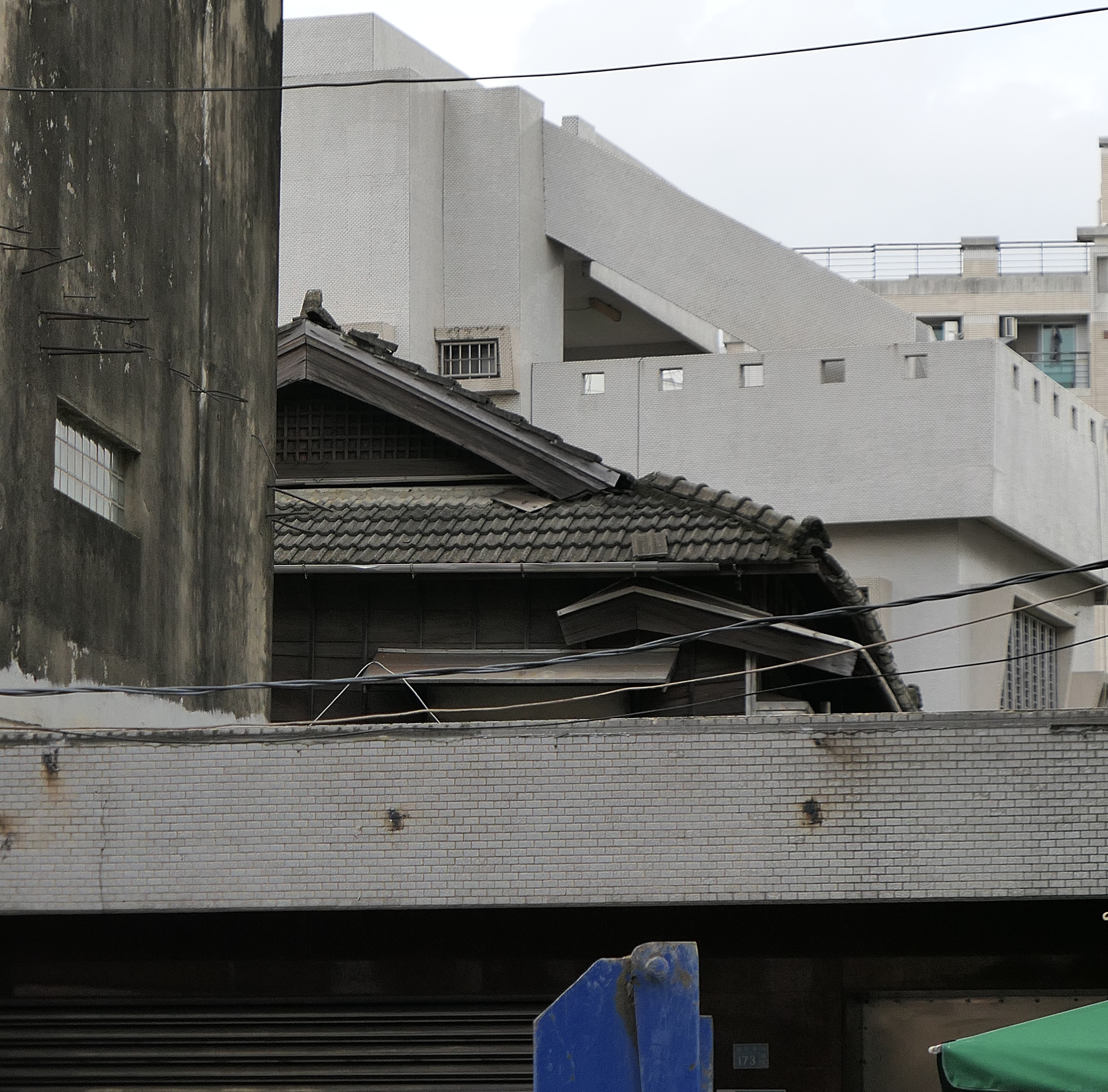 臺灣日治時期的營造商住吉秀松的老屋。